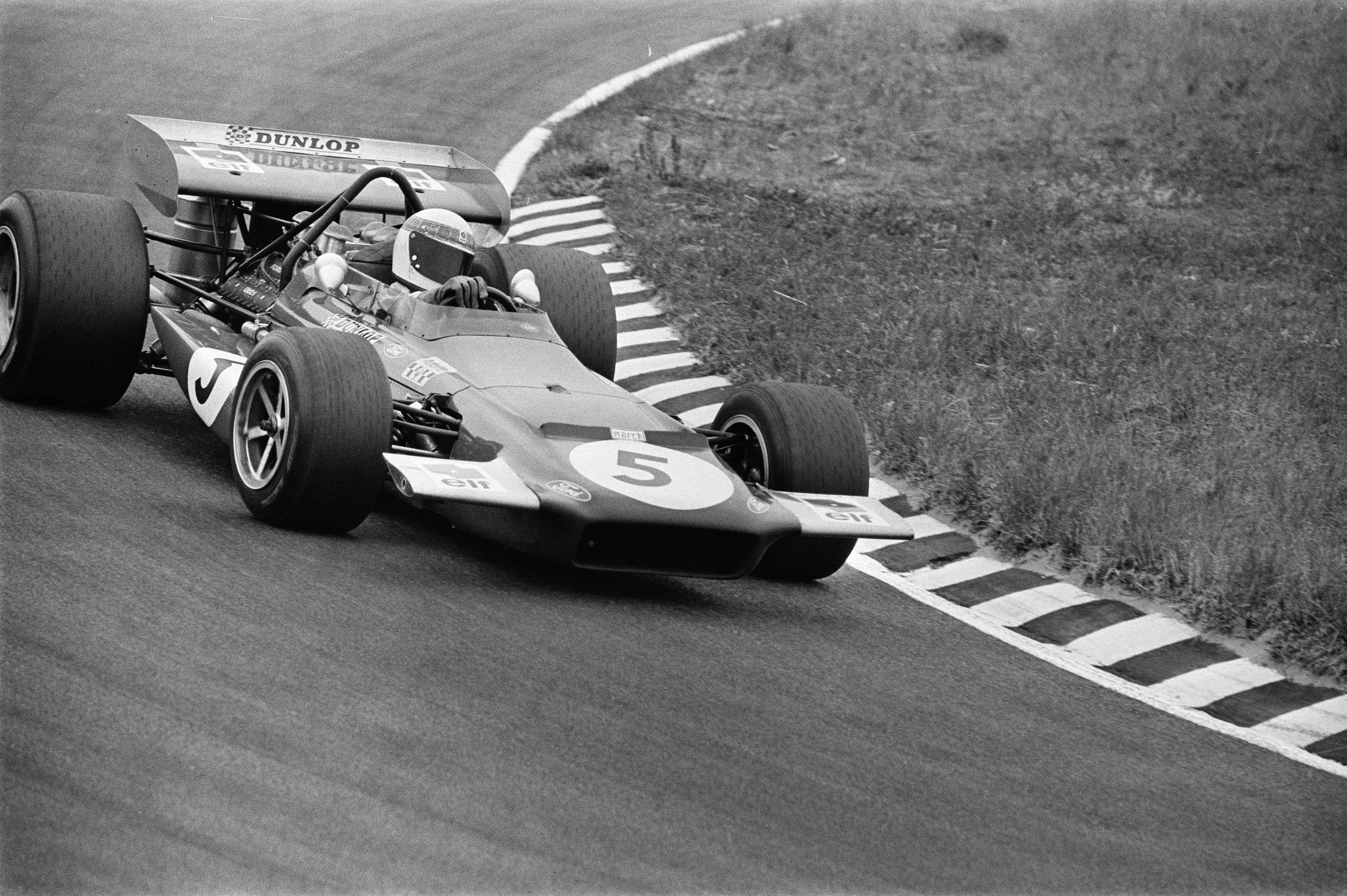 Grand Prix 1970 van Nederland voor Formule I wagens , Zandvoort; aktie.